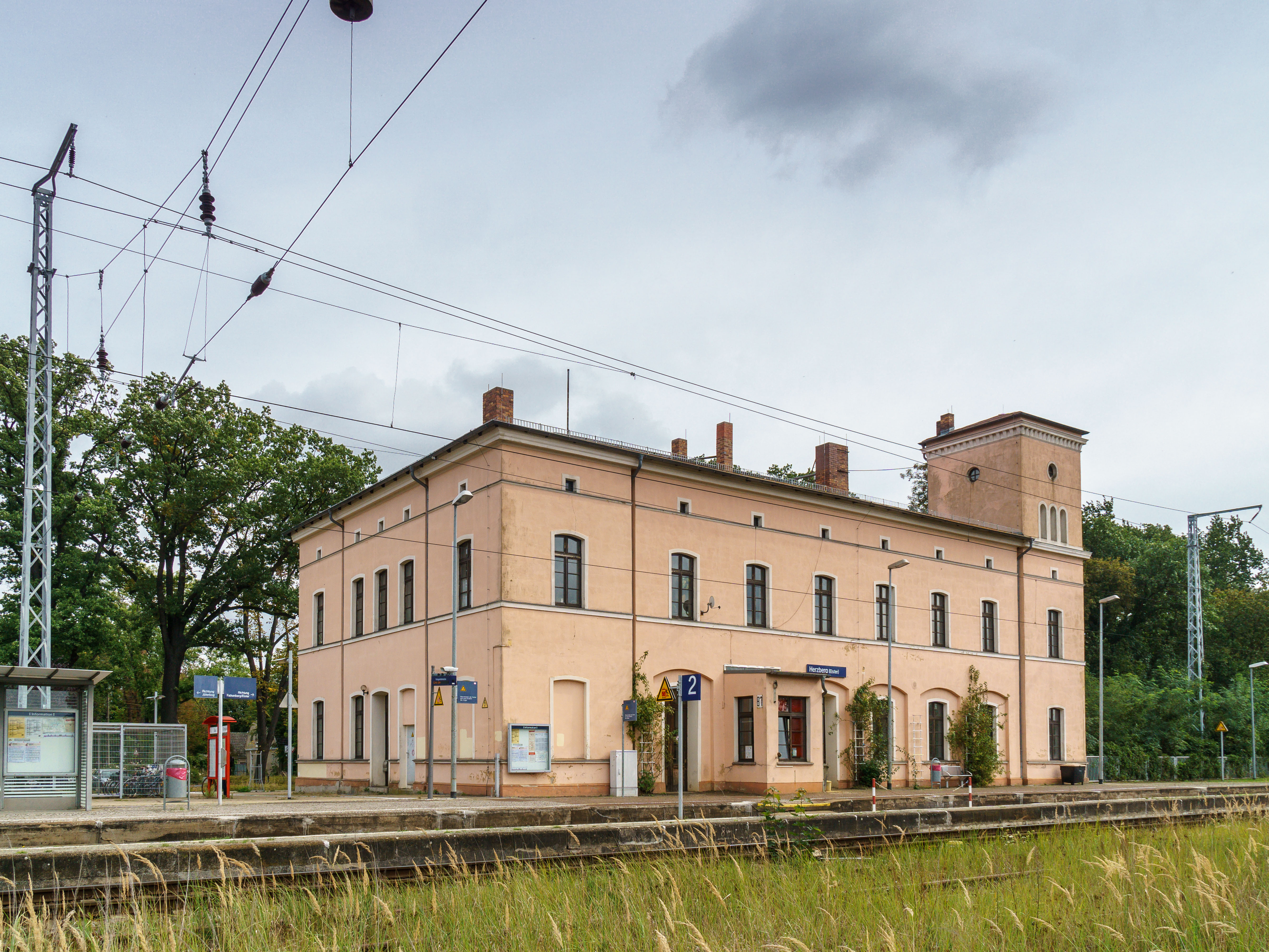 Bahnhofsgebäude Herzberg-West (vorher "Anhalter Bahnhof", "Staatsbahnhof" und "Reichsbahnhof"), Anhalter Straße 148 in Herzberg (Elster)